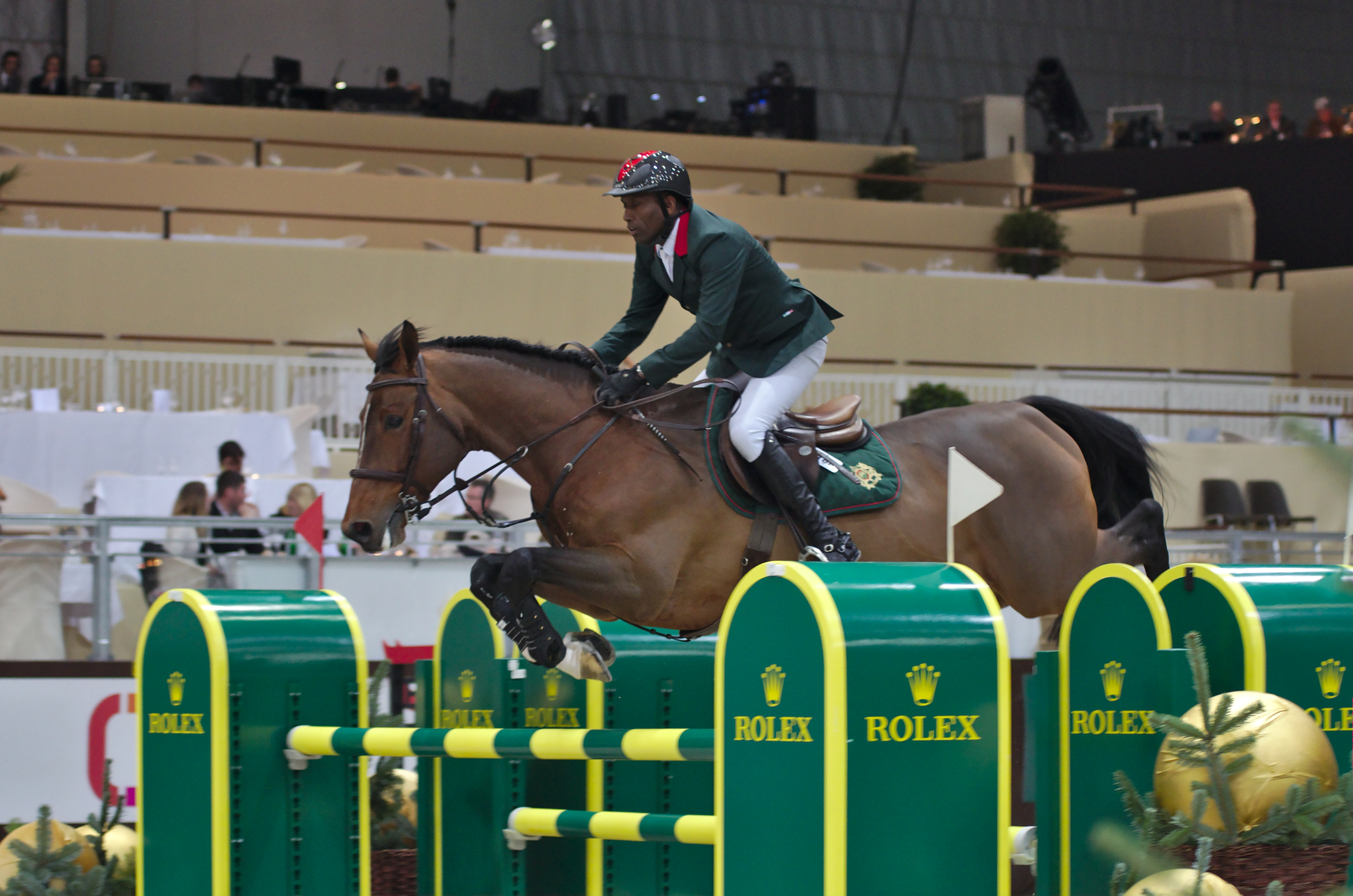 CHI Genève 2013 - 20131212 - Abdelkebir Ouaddar et Quickly de Kerisker